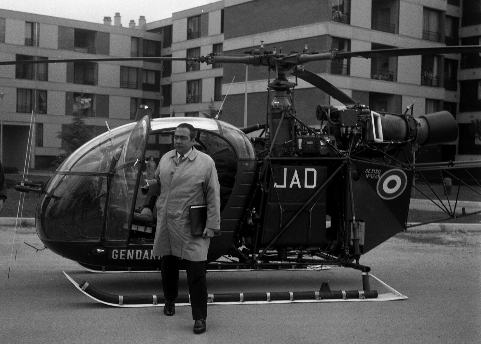 Quartier du Mirail. Le 25 Mars 1968. Vue d'un homme sortant d'un hélicoptère de la gendarmerie dans la ZUP du Mirail, lors d'une visite du quartier avec Georges Candilis, architecte.